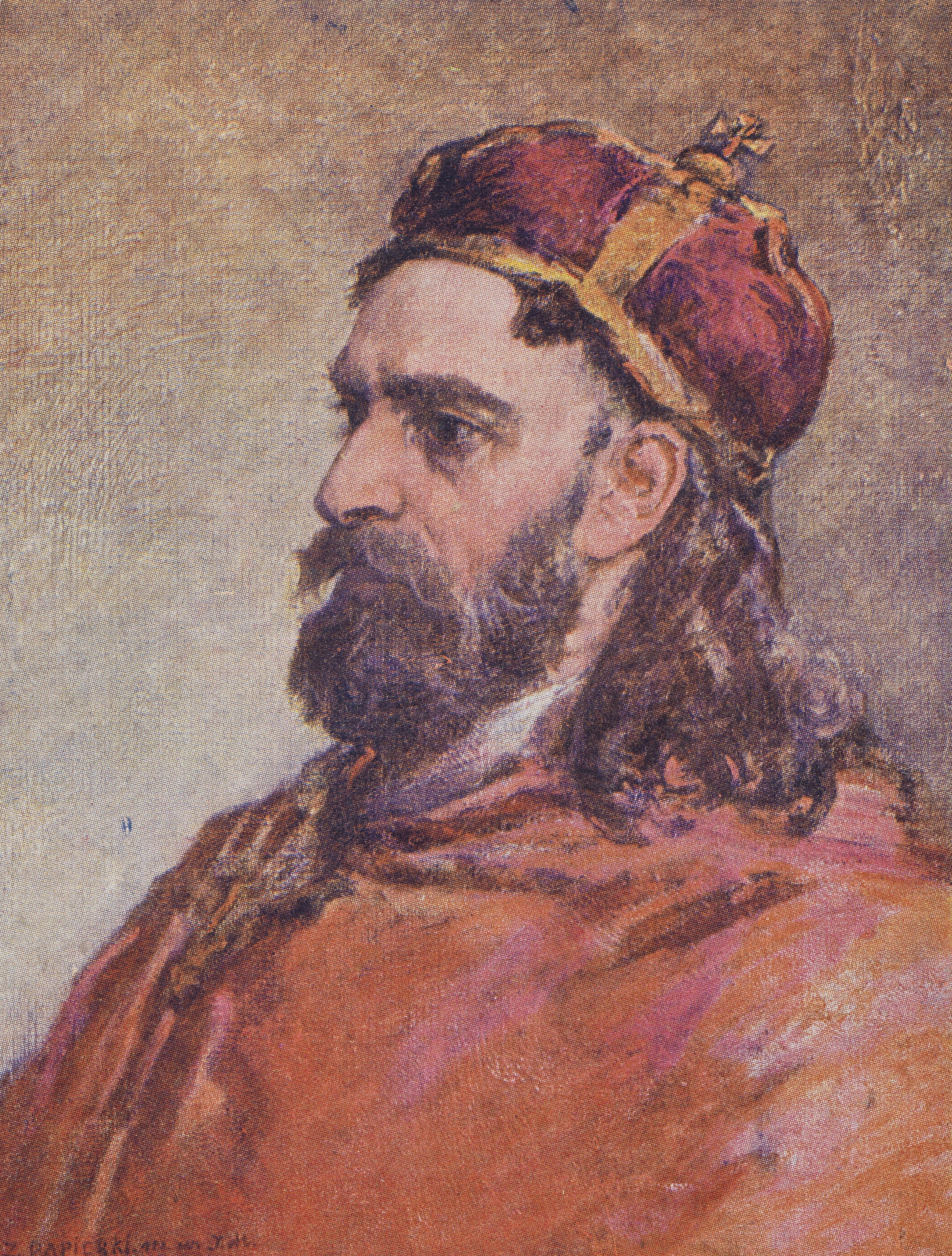 Władysław I Herman wg. Jan Matejki.